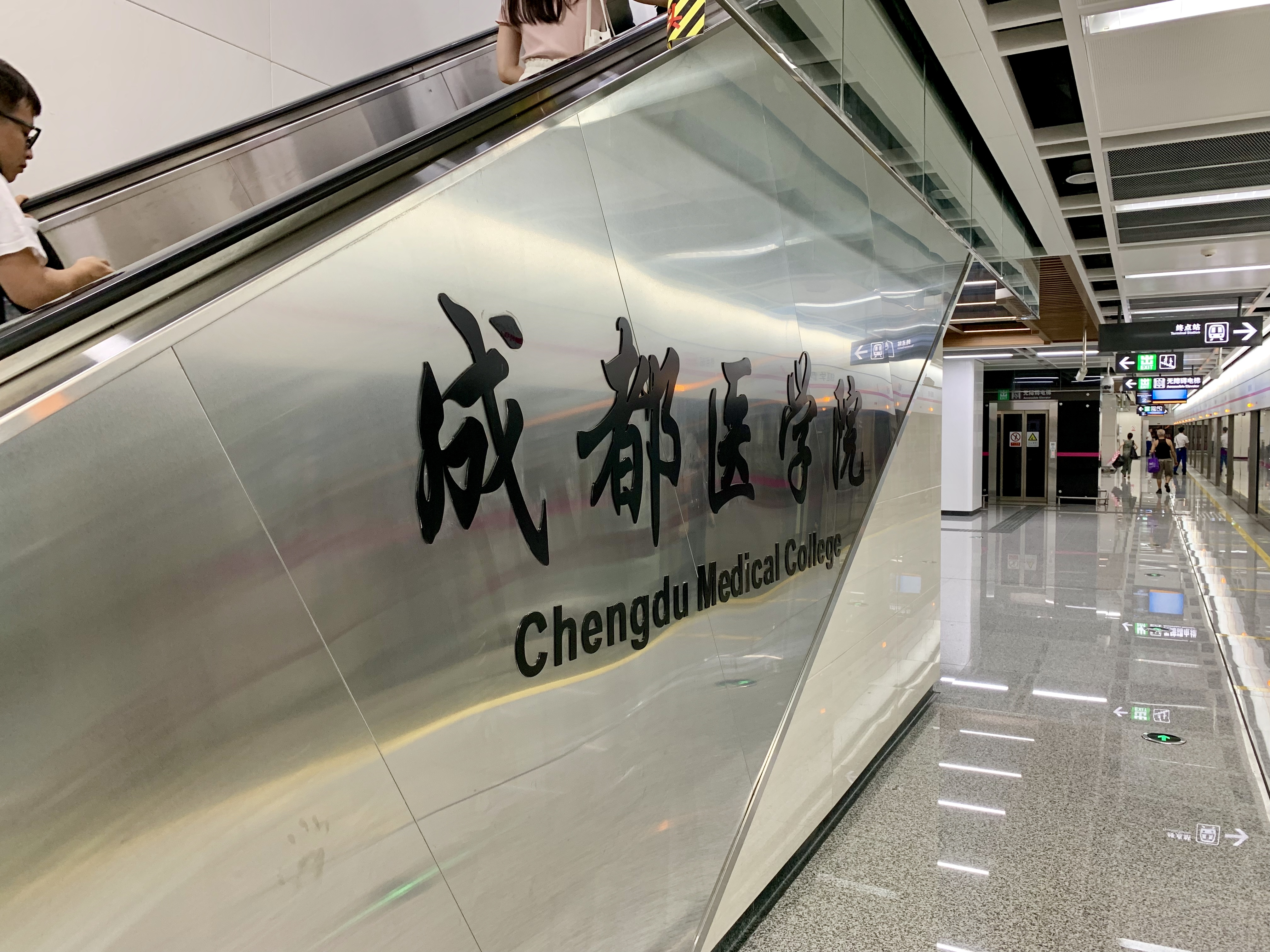 成都地铁成都医学院站